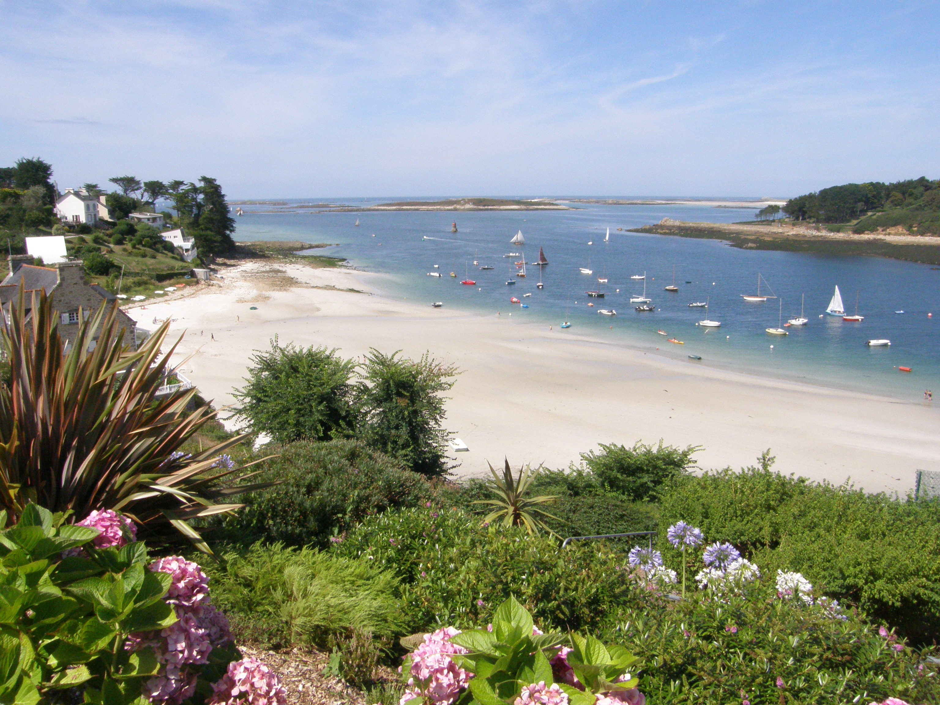 Petite plage sur la rive gauche de l'Aber Benoît à Saint-Pabu, au fond la mer (Manche).